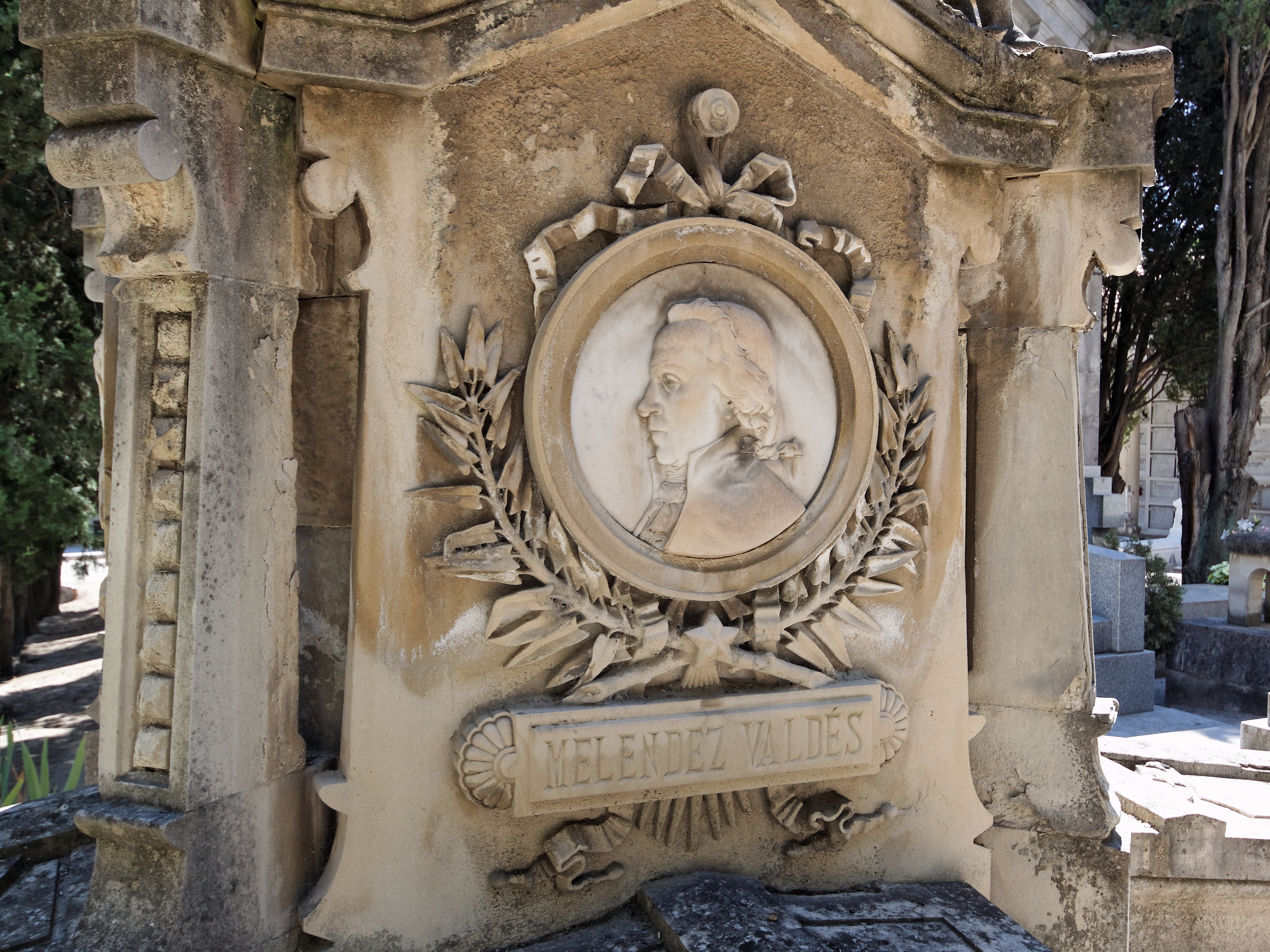 Cementerio de la Sacramental de San Isidro, Madrid. Tumba de Juan Meléndez Valdés, parte del monumento funerario de Goya, Meléndez Valdés, Donoso Cortés y Moratín. Obra del arquitecto Joaquín de la Concha Alcalde y del escultor Ricardo Bellver, realizada en piedra y mármol en 1887.